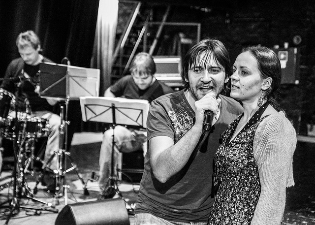 A rehearsal in Rakvere Theatre's main stage.